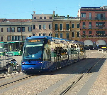 translohr